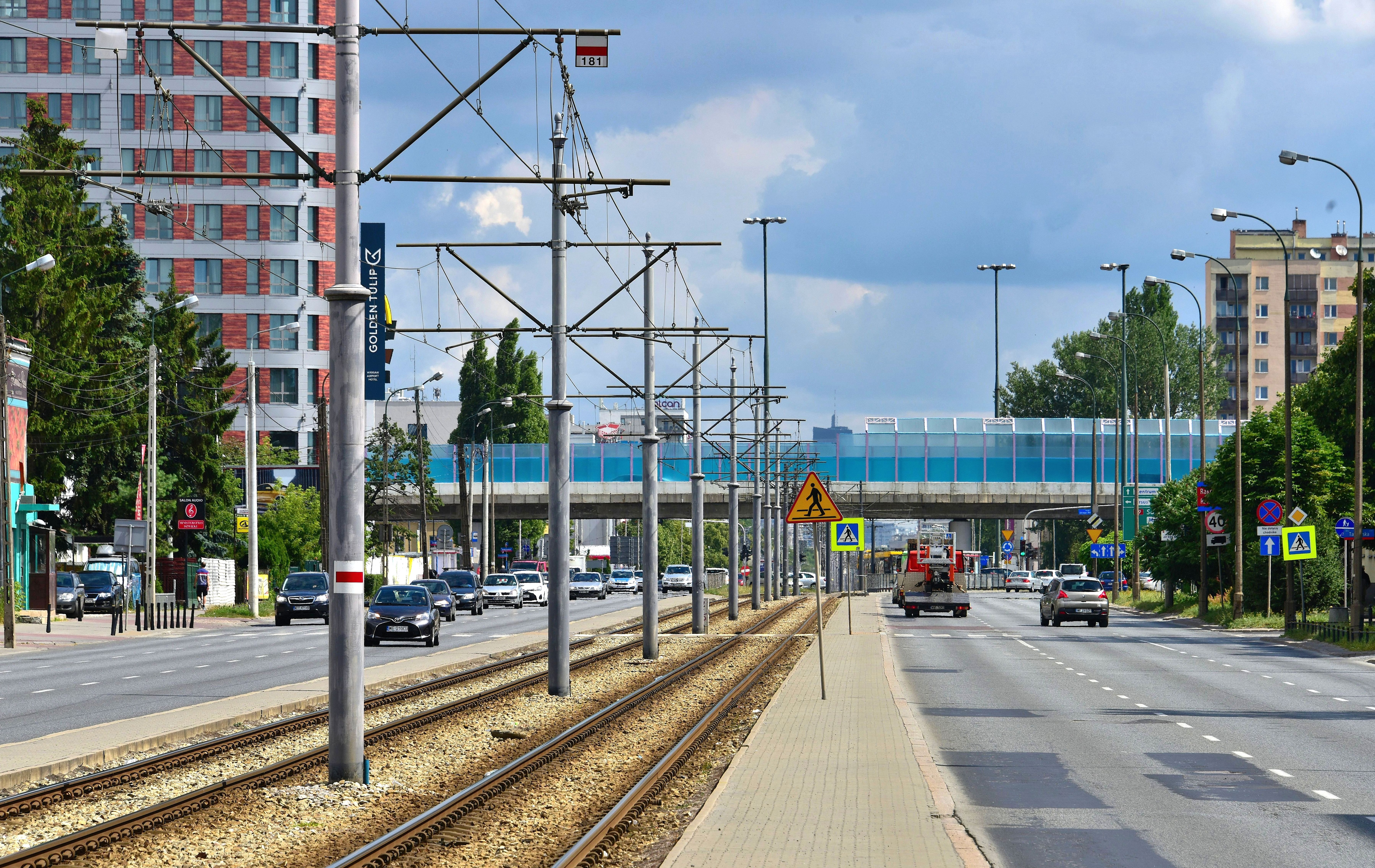 Aleja Krakowska na wysokości ul. Łopuszańskiej/Hynka w Warszawie